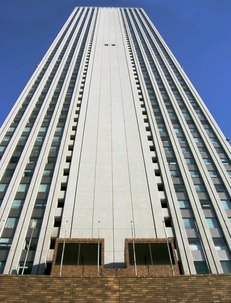 Sunshine_60_Ikebukuro_Tokyo Japan